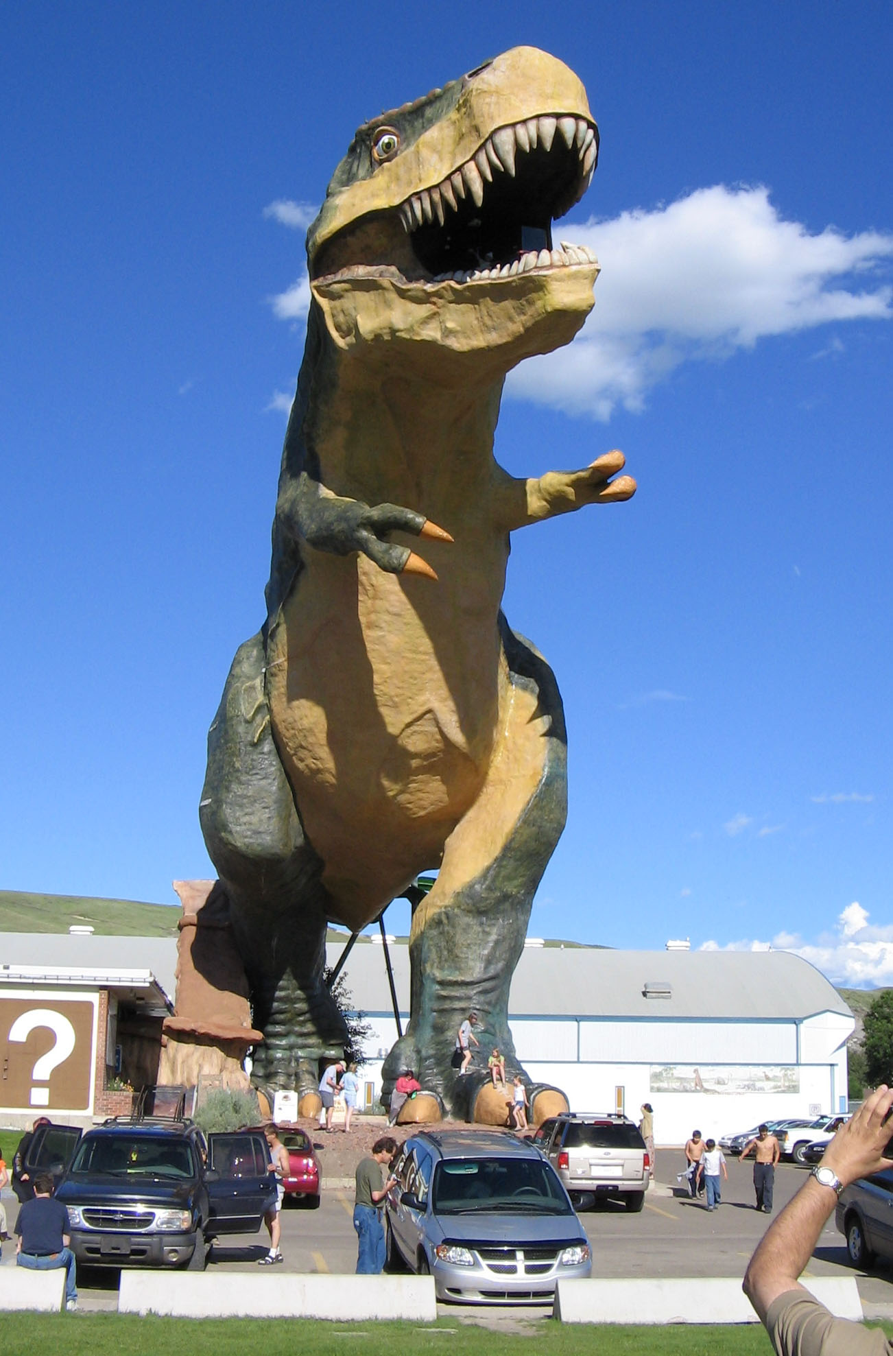 Fotis: Paul Hopkins